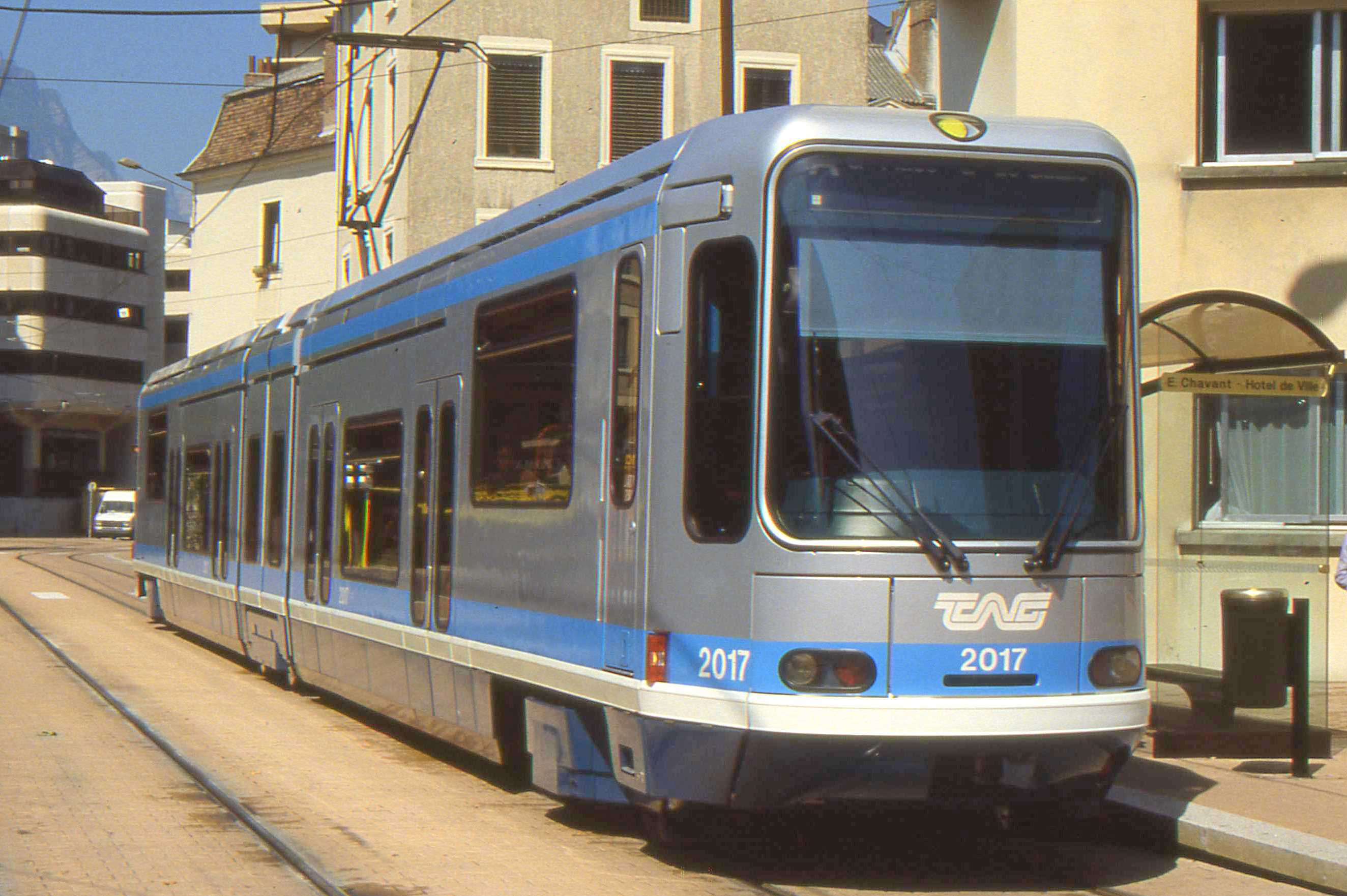 Photo 9. Rame Alsthom du tramway de Grenoble (TAG). Gières est desservie par la ligne B, entrée en exploitation en 1990.